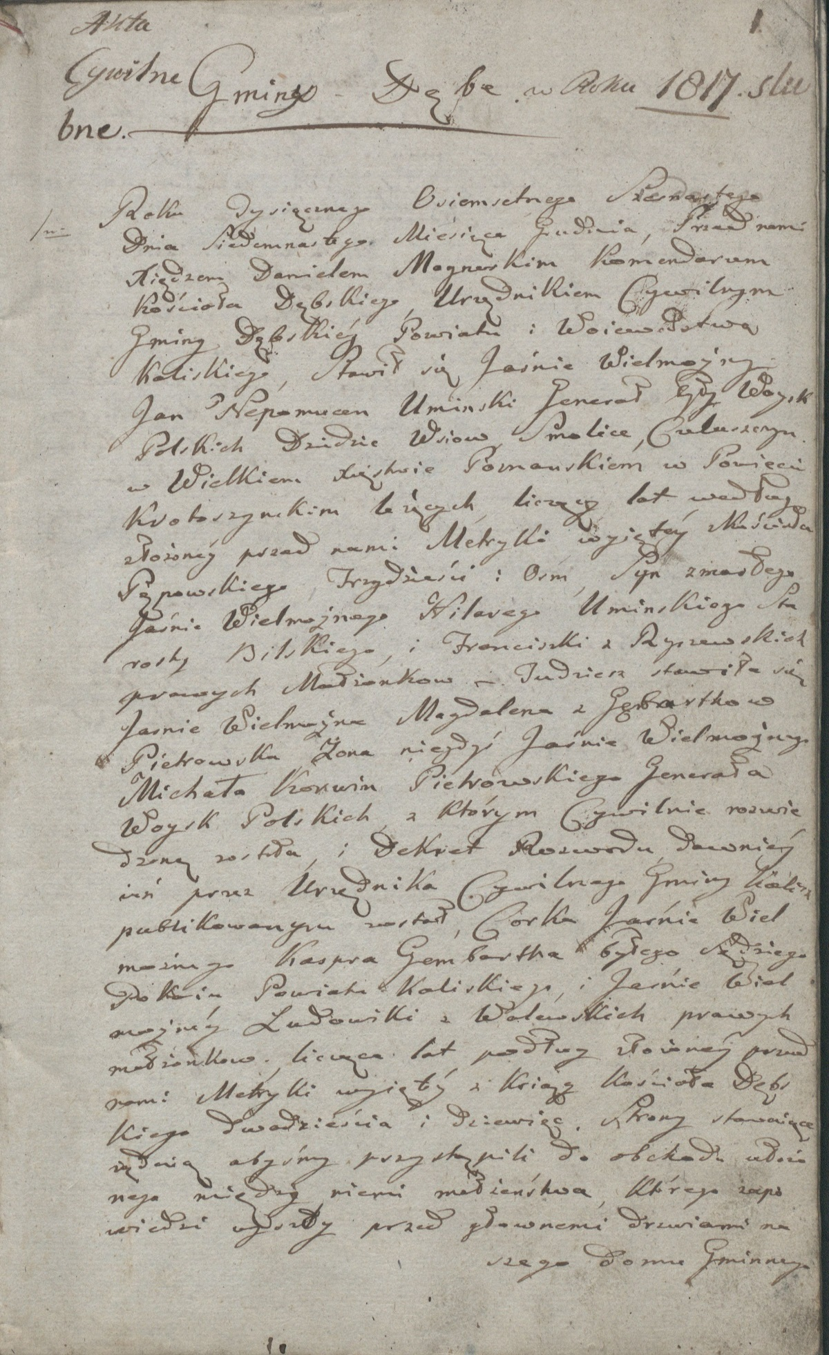 numer 1, strona 1